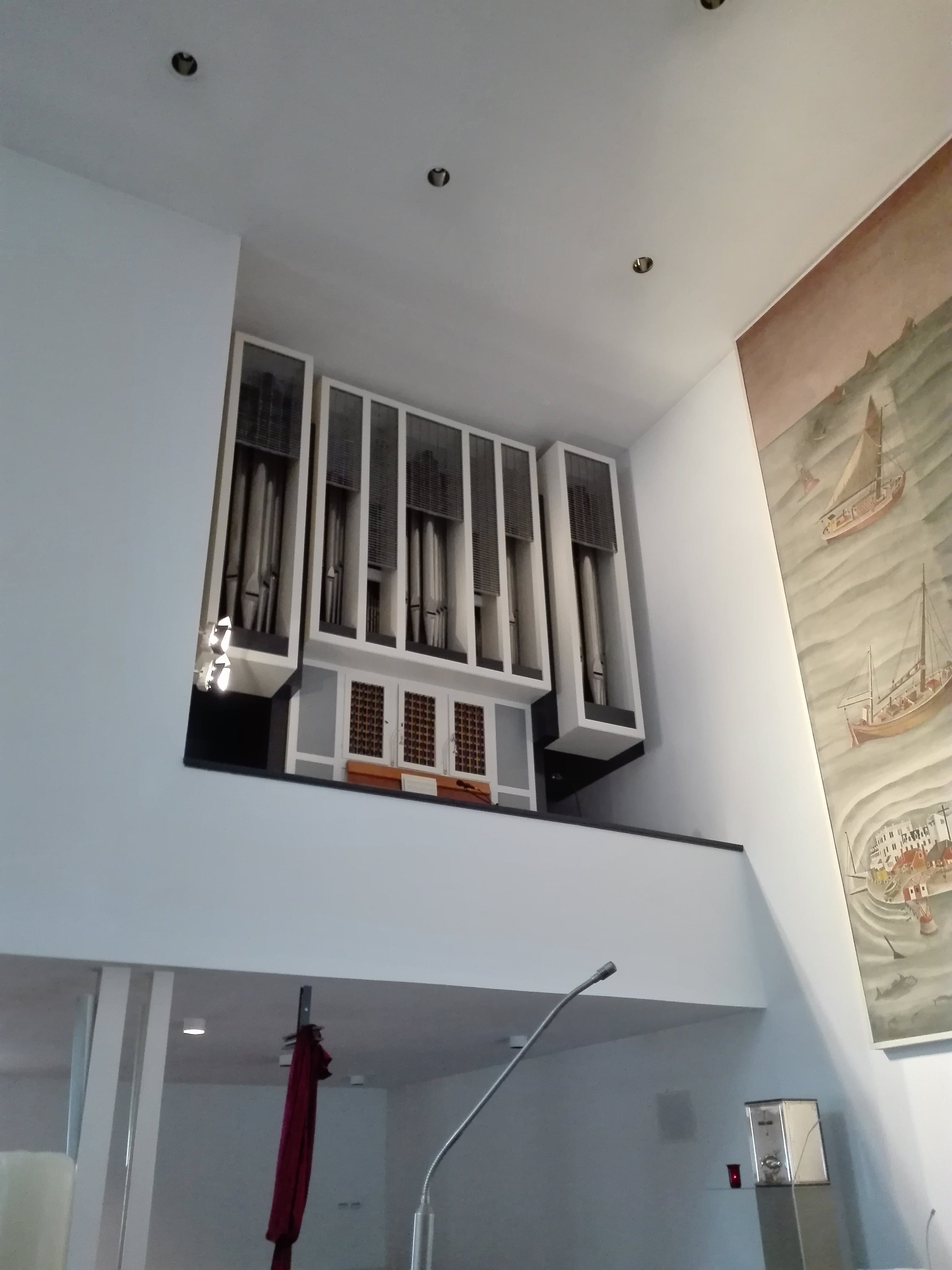 Katholische Kirche Stella Maris auf Norderney